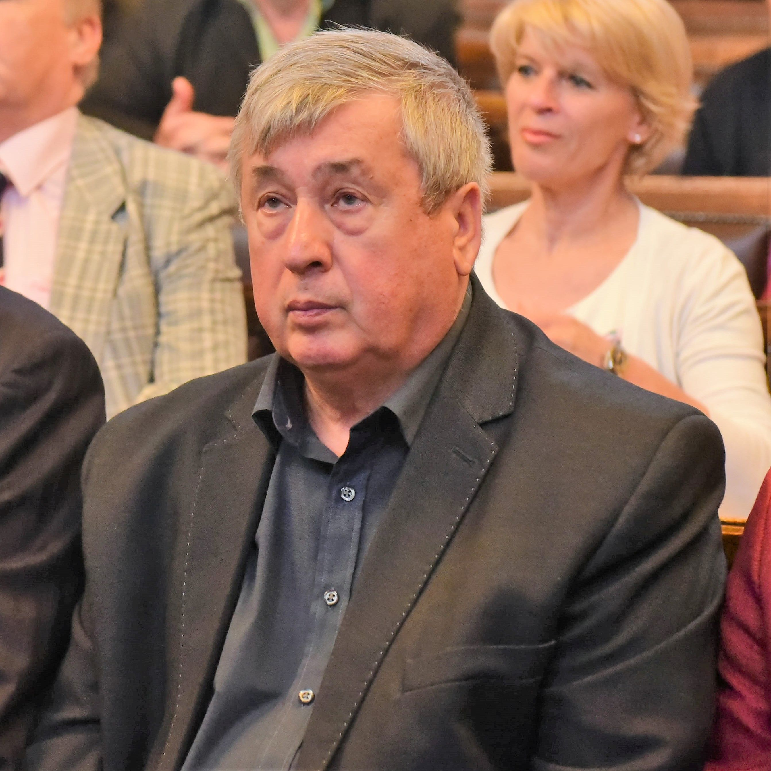 Klampár Tibor kétszeres világbajnok magyar asztaliteniszező